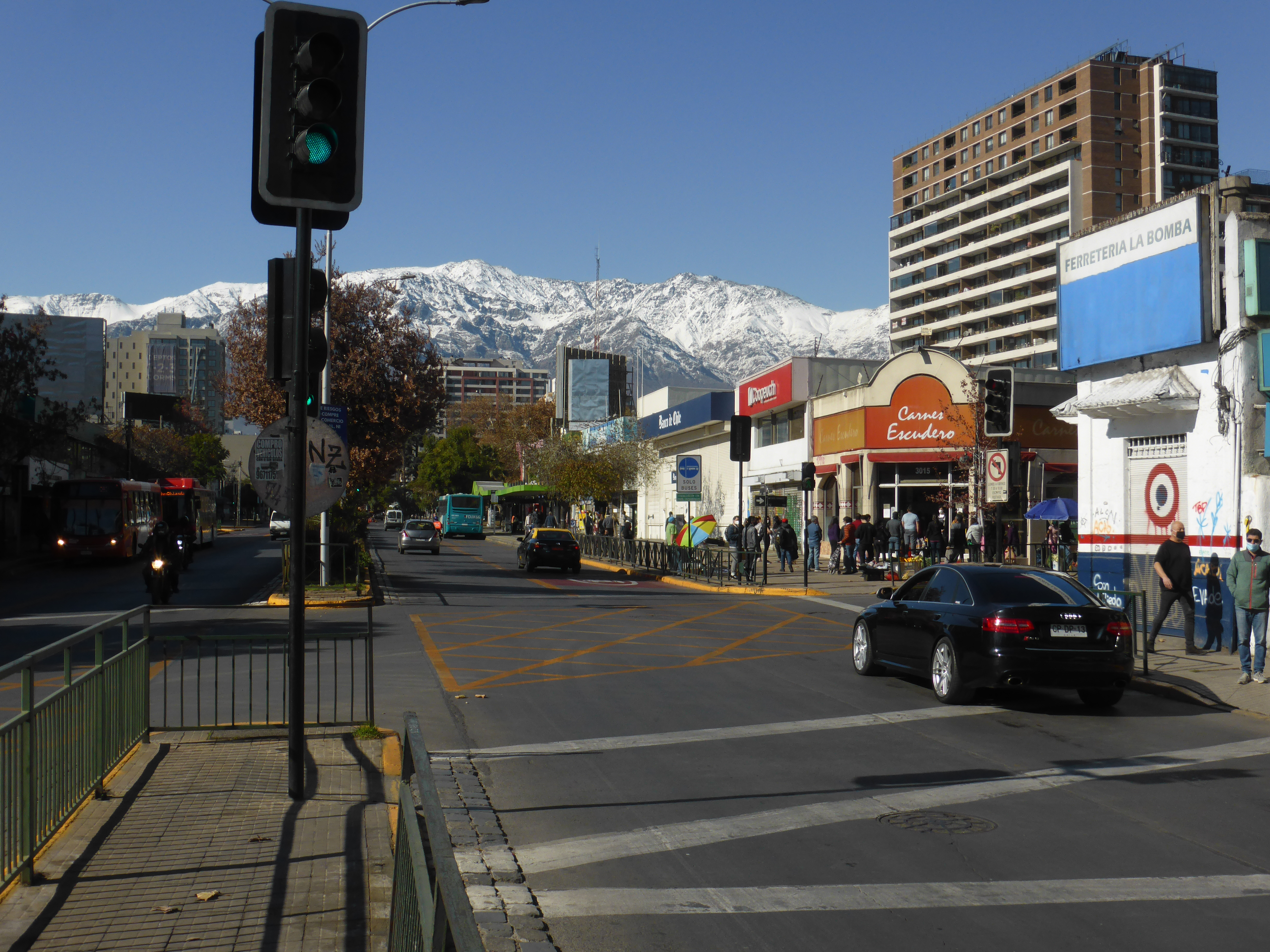 Avenida Irarrázaval. Cruce, a la izquierda con avenida Suecia, y a la derecha con Exequiel Fernández. Al fondo, nieve en la Cordillera de los Andes.